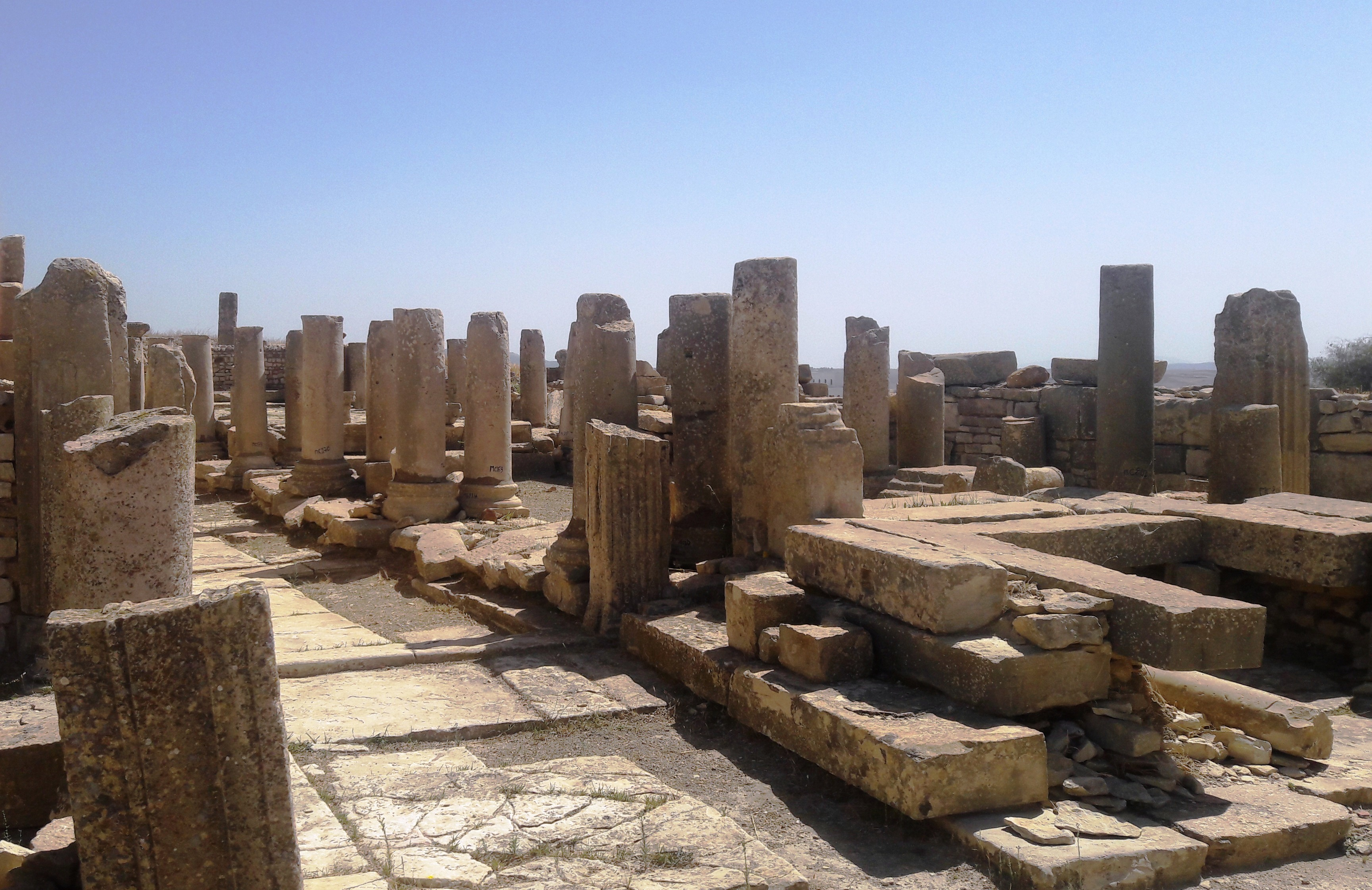 Basilique au nord-est de l'arc de Trajan